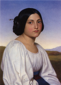 Porträt einer Italienerin, vermutlich Vittoria Caldoni